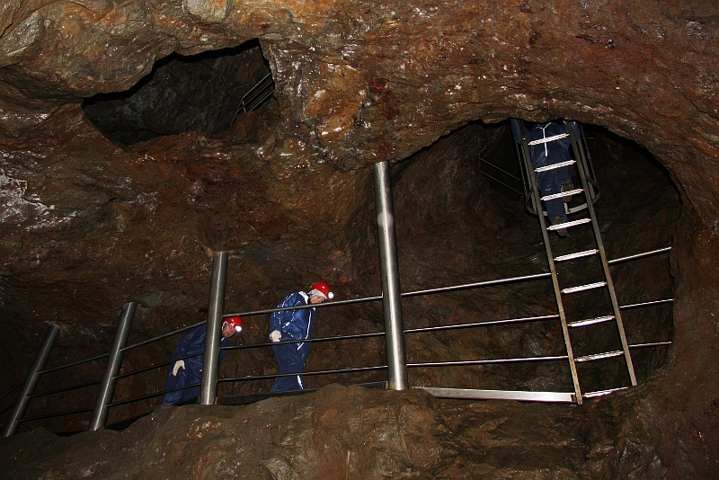 Prohlídková trasa v Důlním díle Kovárna v krkonošském Obřím dole